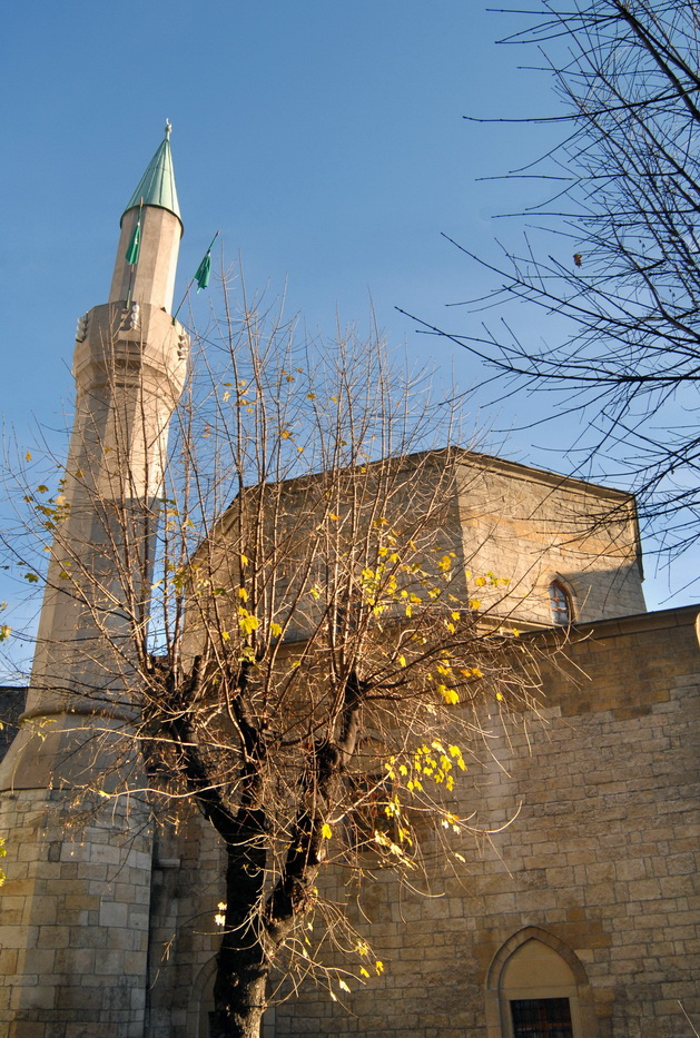 Autor by Snežana Negovanović